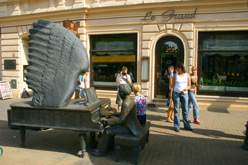 Artur Rubinstein Memorial, Piotrkowska Street, Lodz, Poland